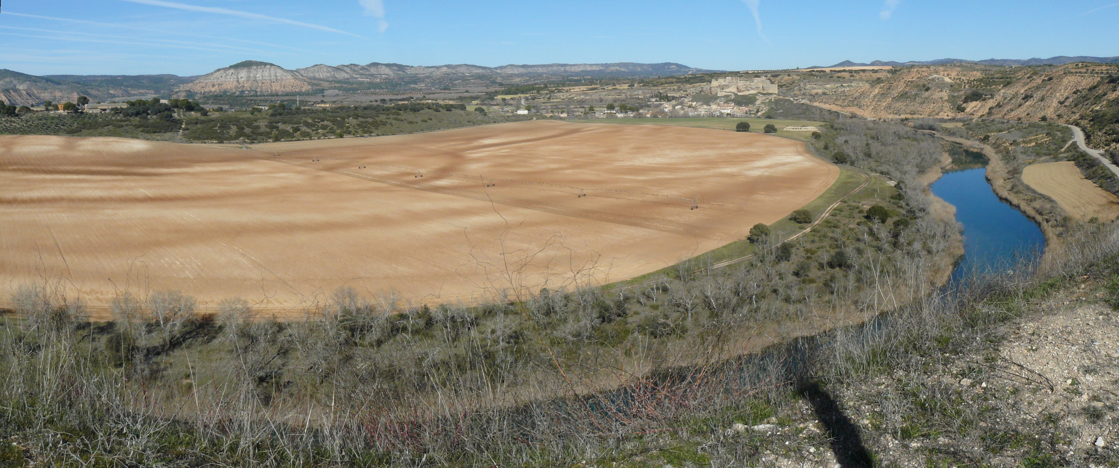 Vista deZorita de los Canes, Guadalajara, desde Recópolis.